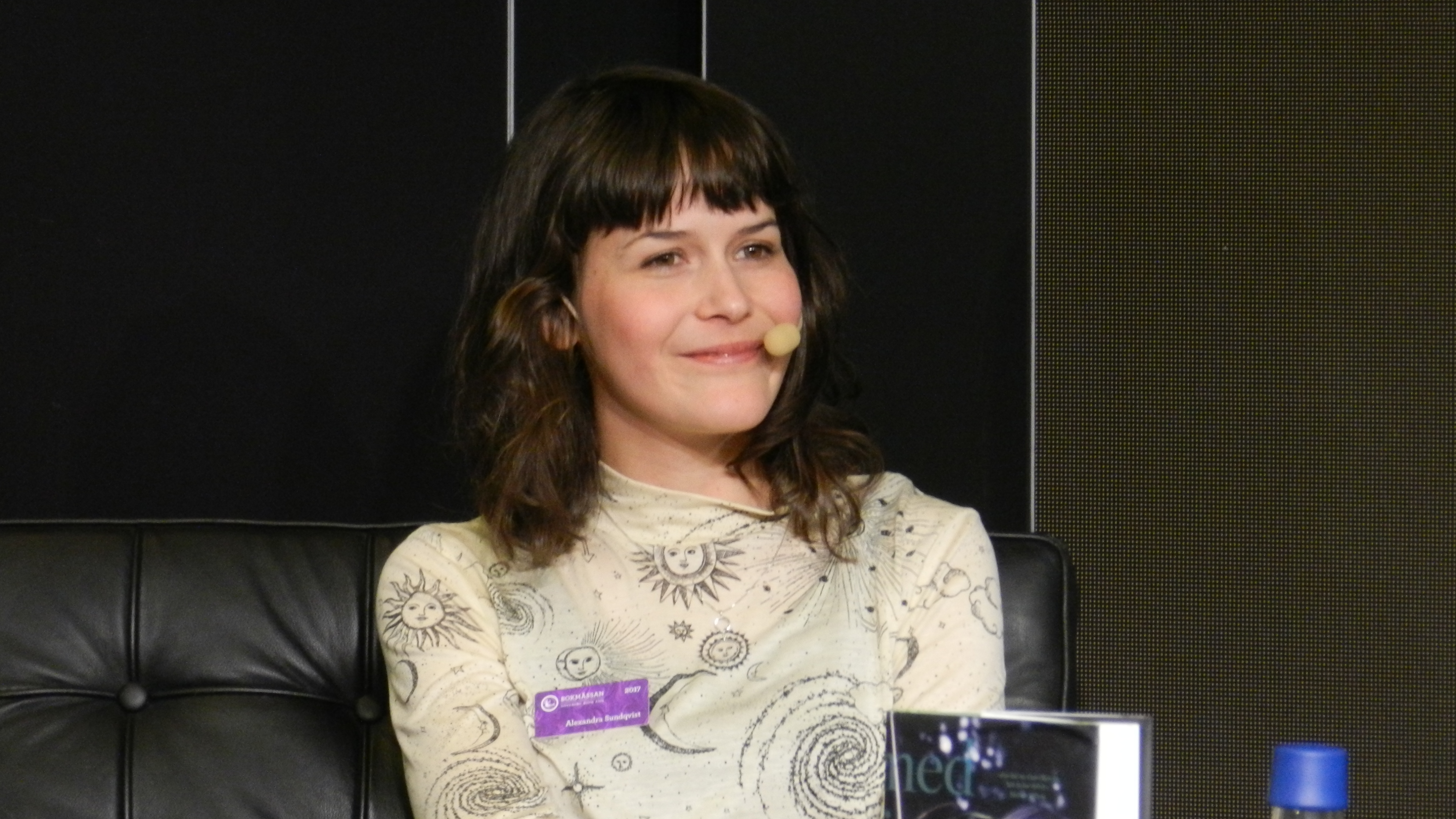 Alexandra Sundqvist på Bokmässan i Göteborg 2017.